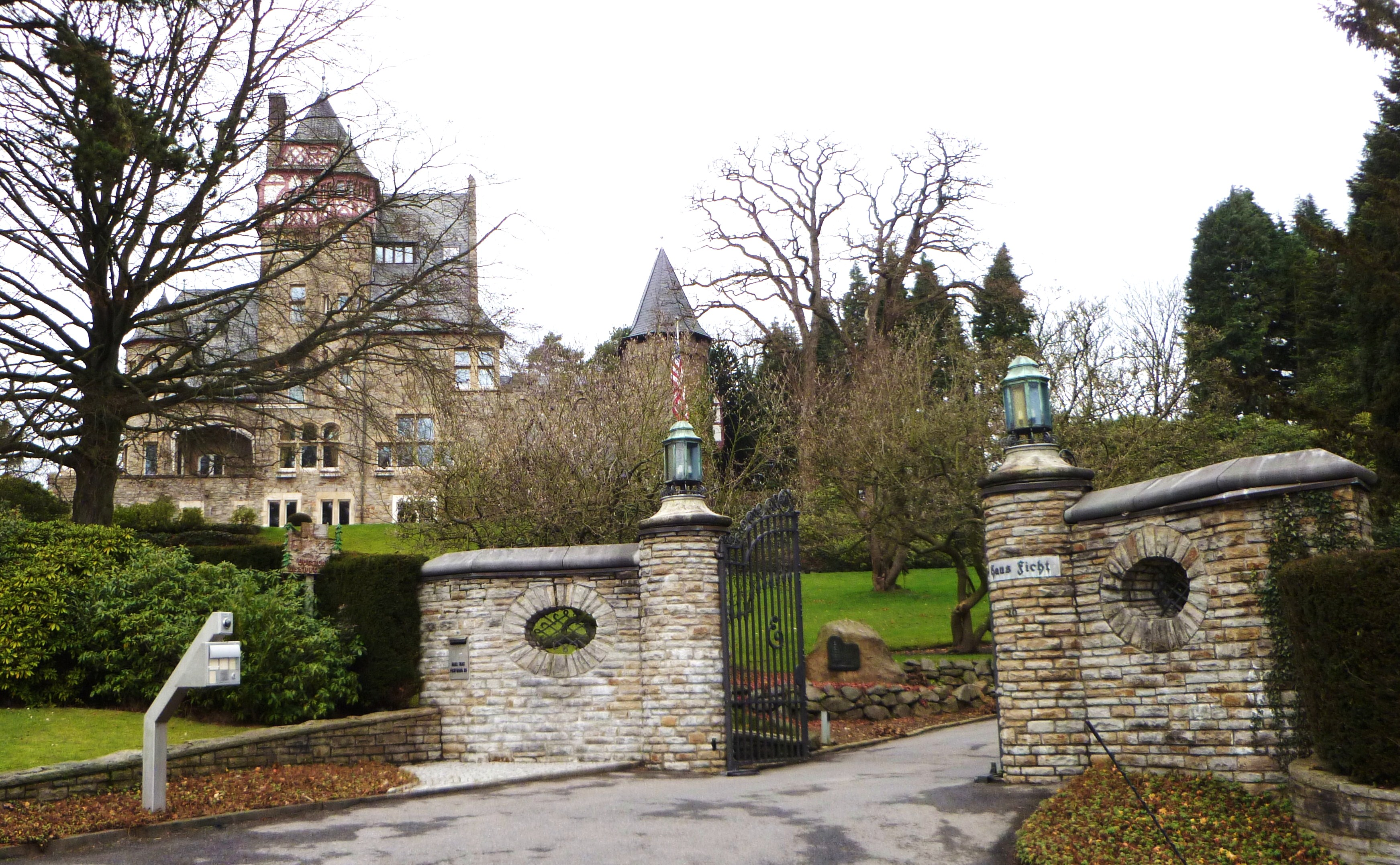 Burghaus Classen in Aachen, 1899-1900 von Friedrich Pützer